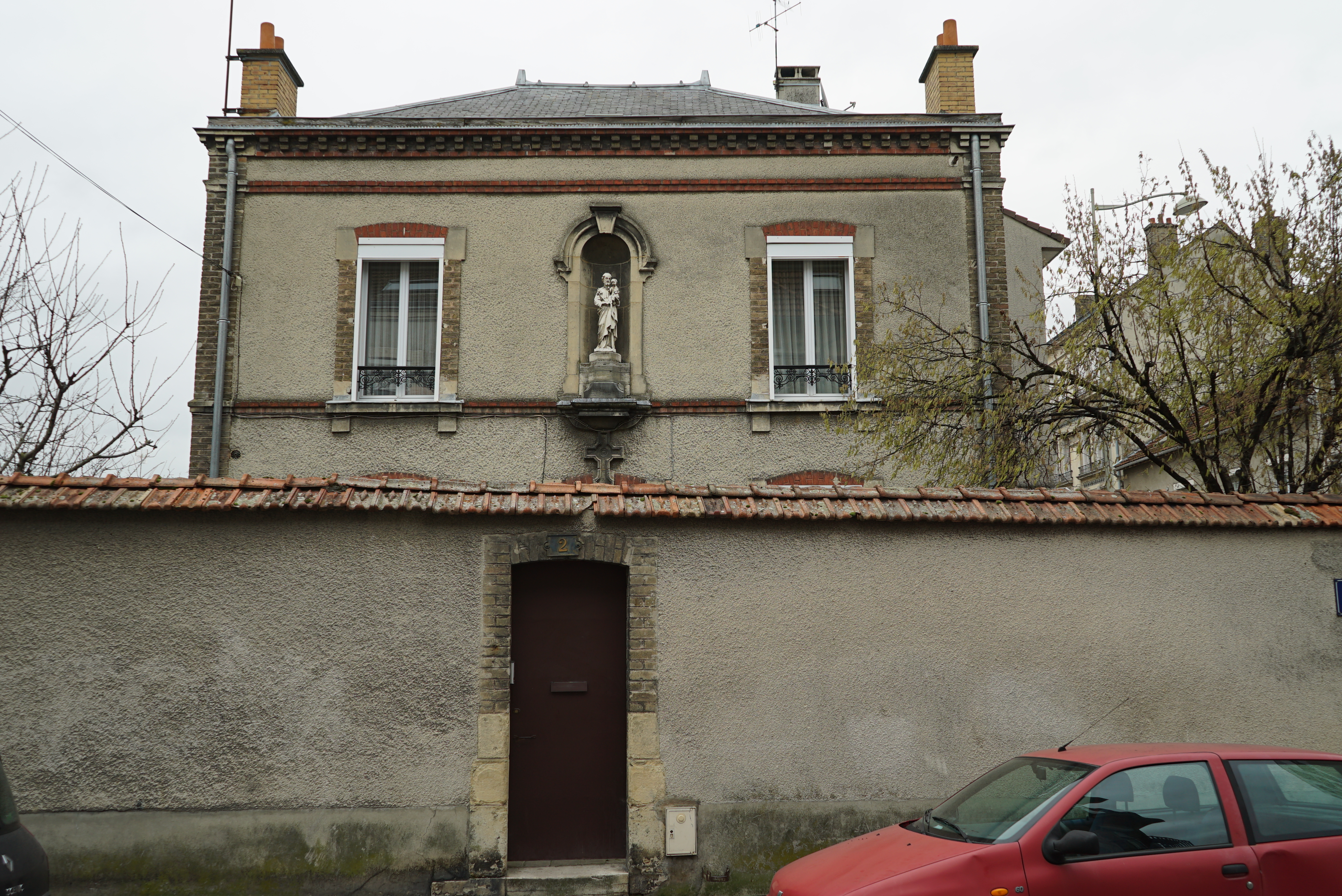 une vue de la rue Marcel-Thil. Ancienne maison des soeurs.